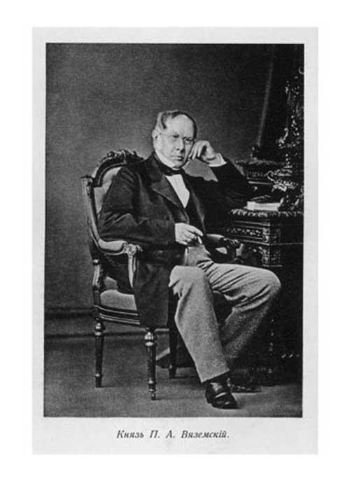 Фотография П. А. Вяземского